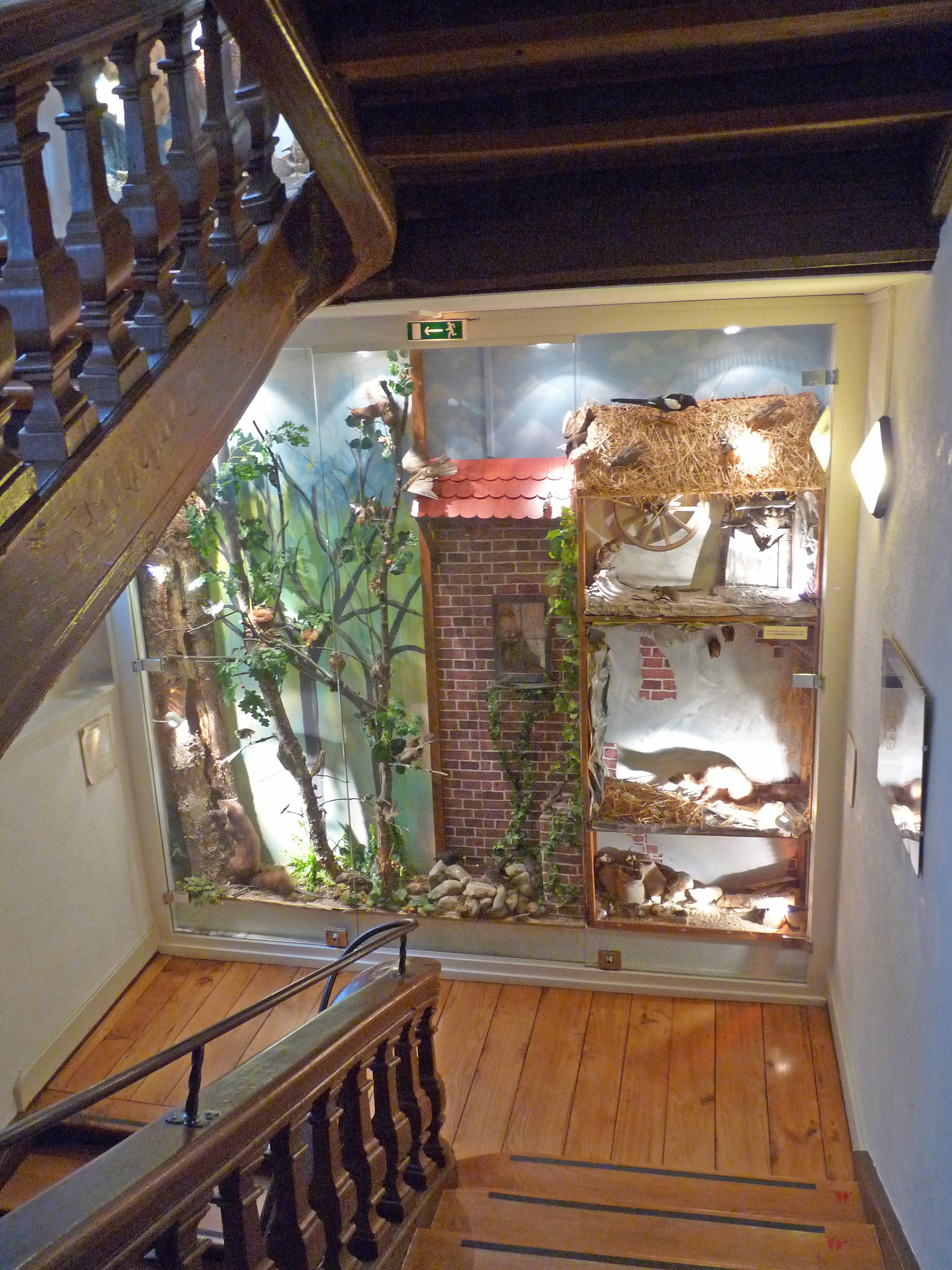 Vitrines dans la cage d'escalier du Musée d'histoire naturelle et d'ethnographie de Colmar